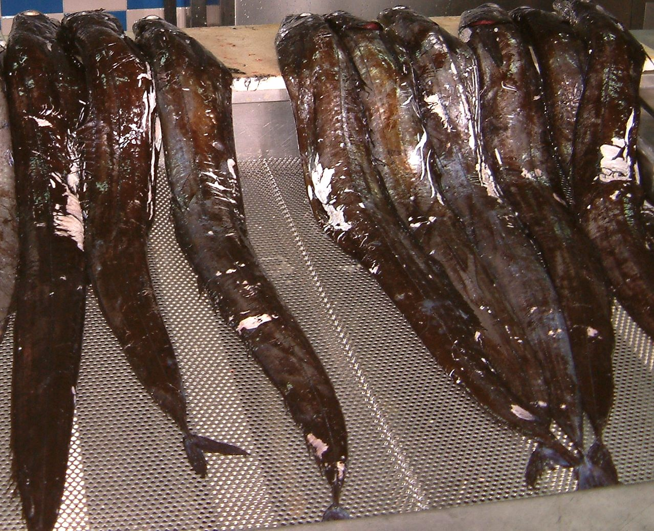 Madeira_schwarzer_degenfisch_5-07. Photograph: Peggy